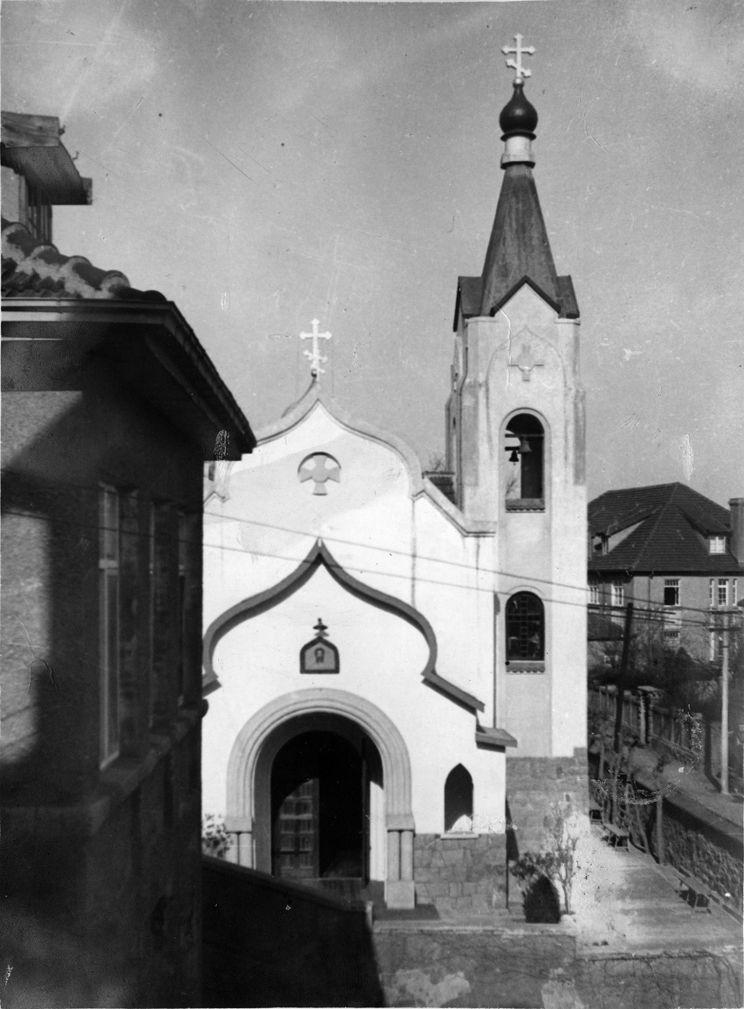 Софийская церковь в Циньдао